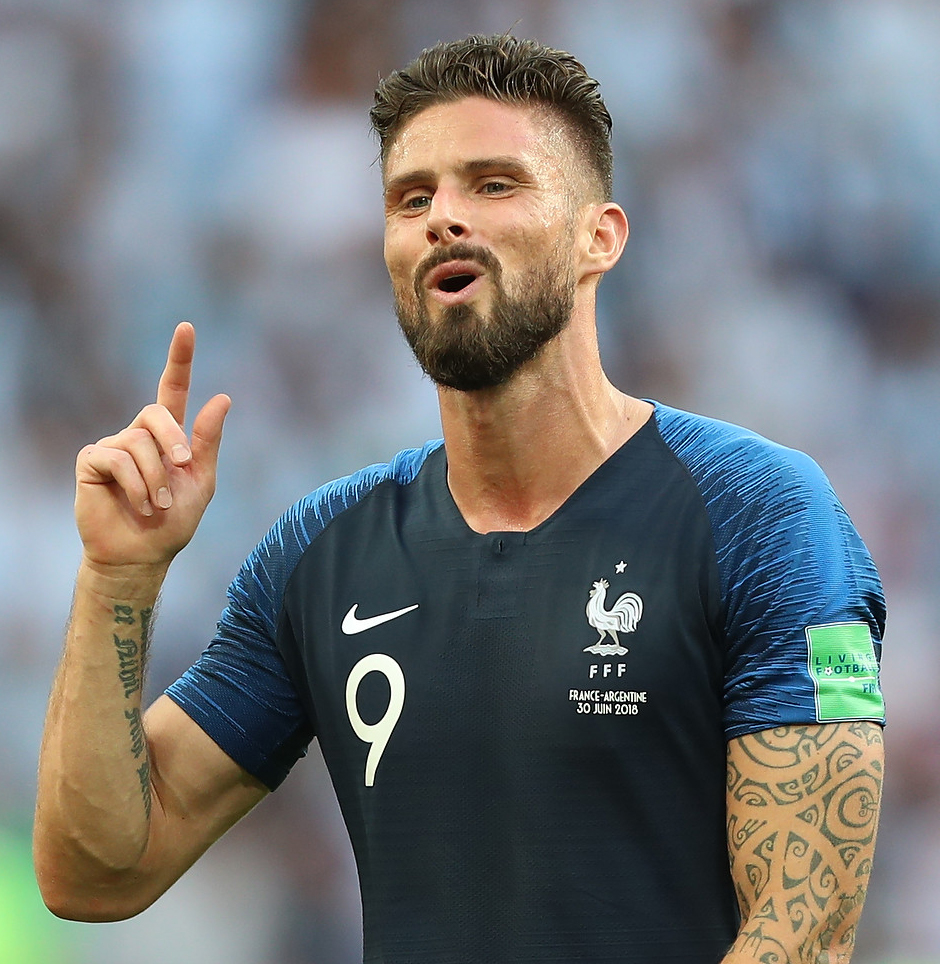 Сборная Франции оставила Месси и Аргентину за бортом чемпионата мира 2018